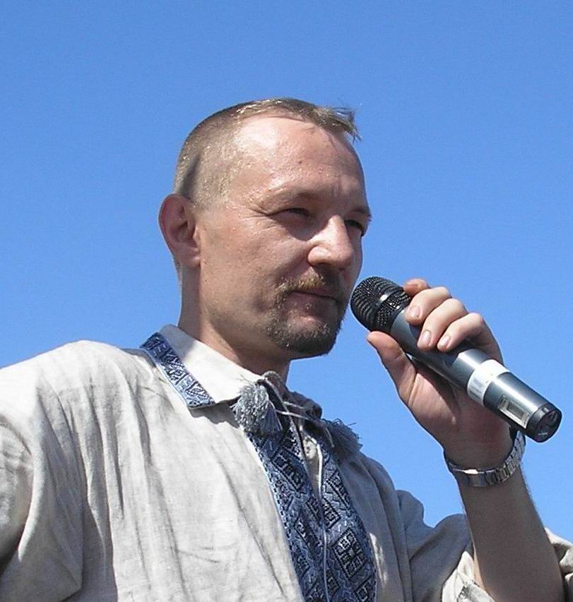 Письменник Дмитро Білий на фестивалі у Гуляйполі, 24 серпня 2007